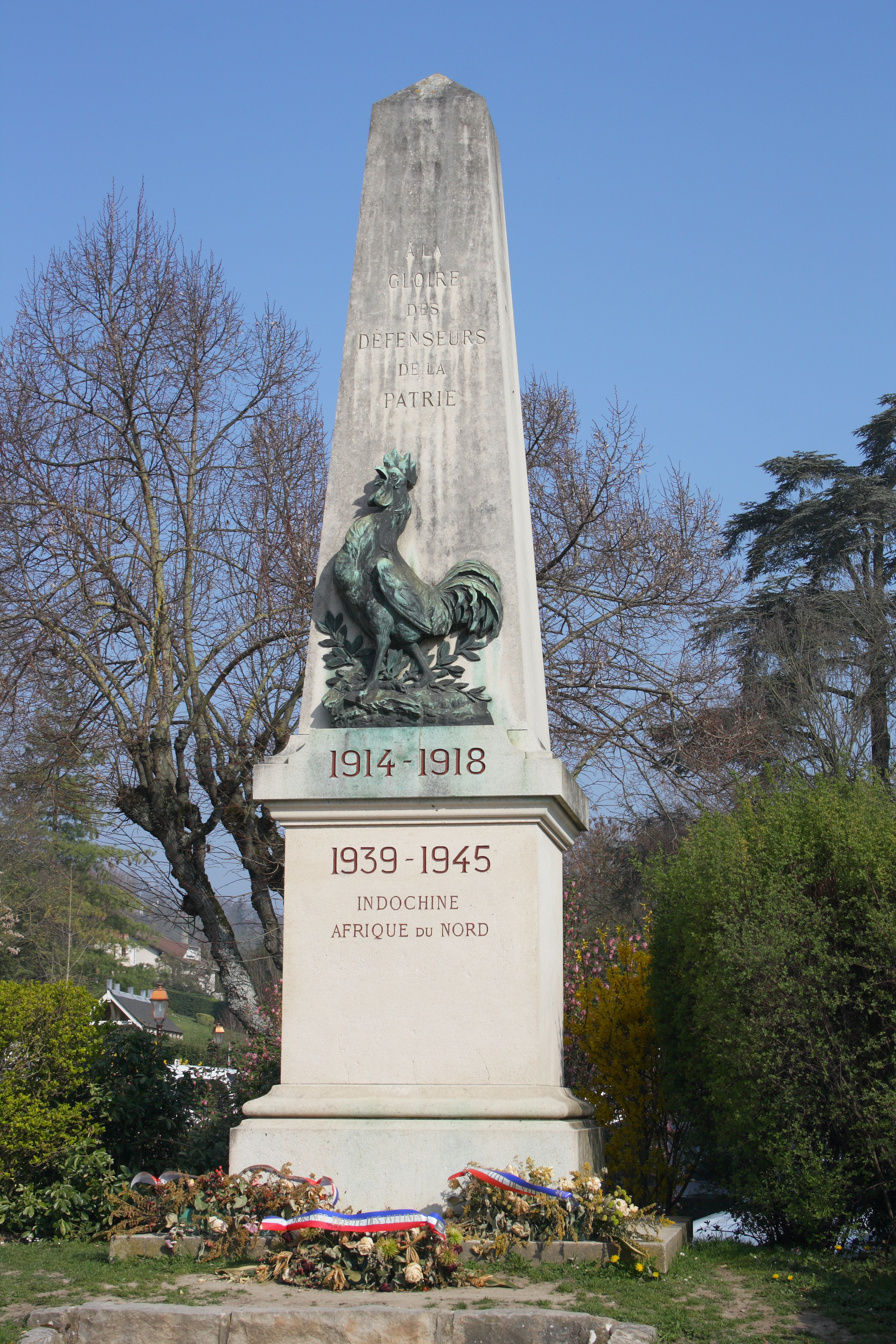 Kriederdenkmal für die Gefallen des Ersten und Zweiten Weltkriegs in Villennes-sur-Seine